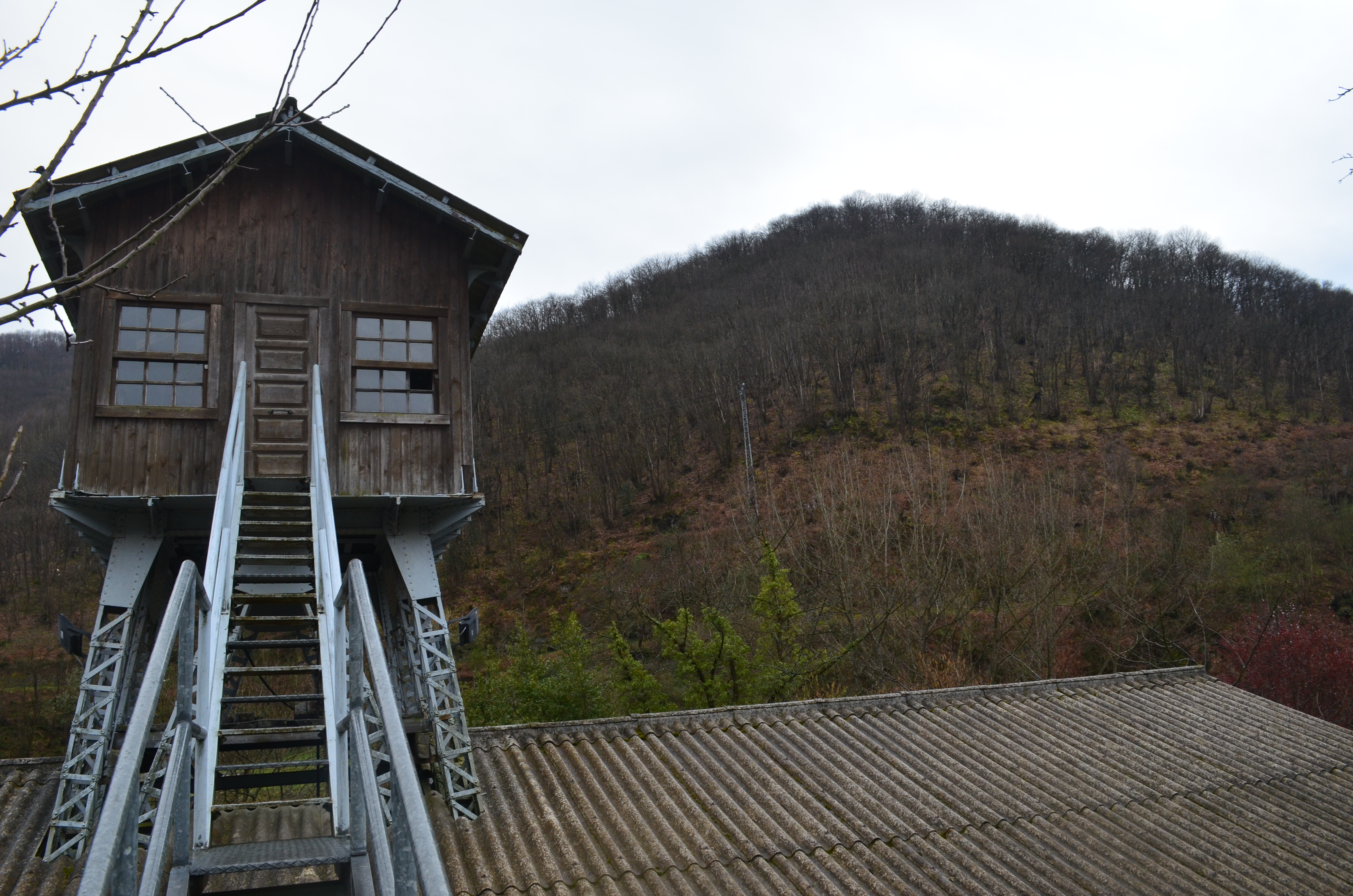 Pozo Espinos en Valle de Turón, Mieres (Asturias)